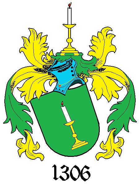 Ortswappen Gemeinde Dürrhennersdorf